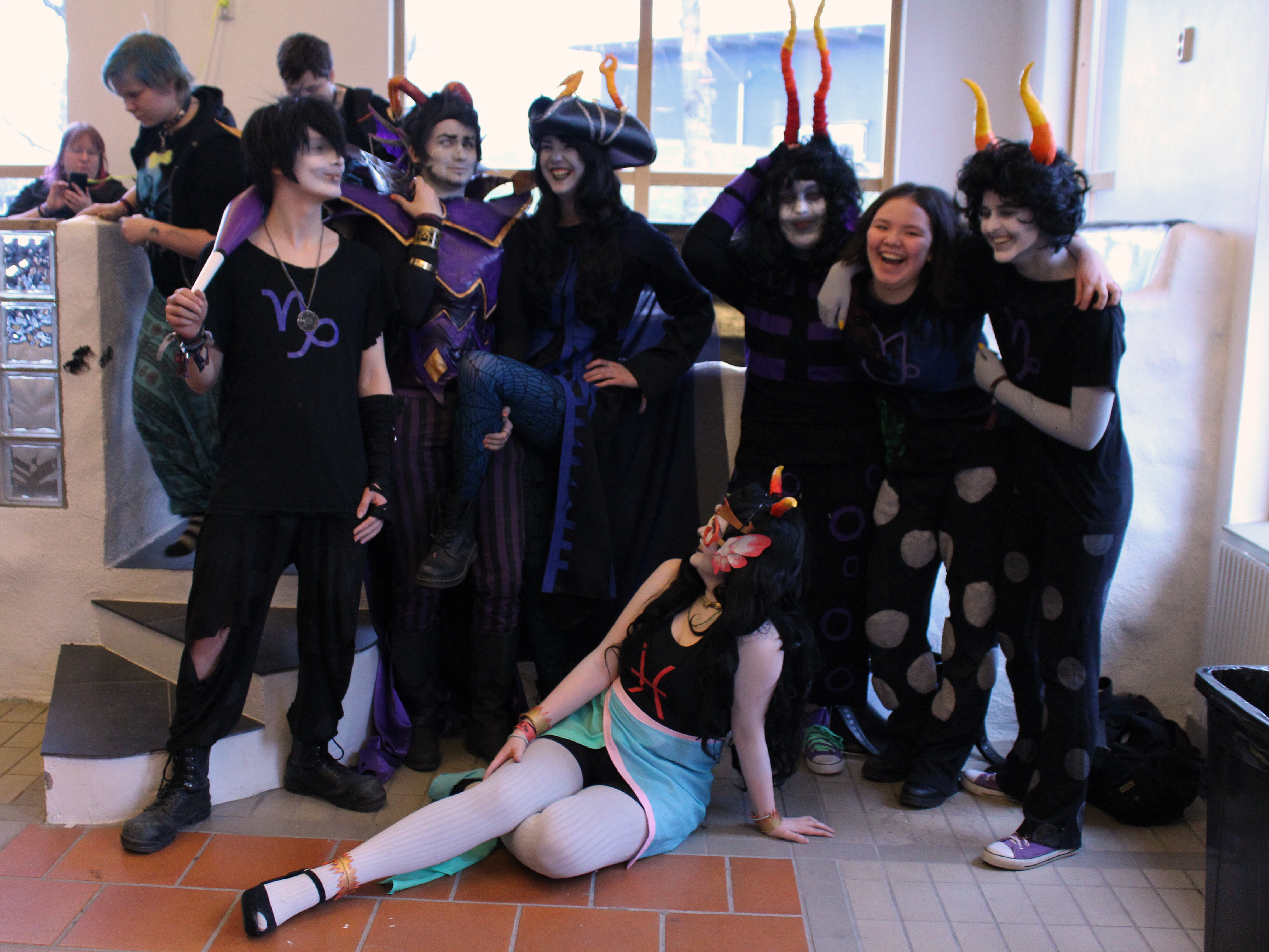 A small group of Homestuck cosplayers, posing for a meetup at Närcon Vinter 2017, Linköping